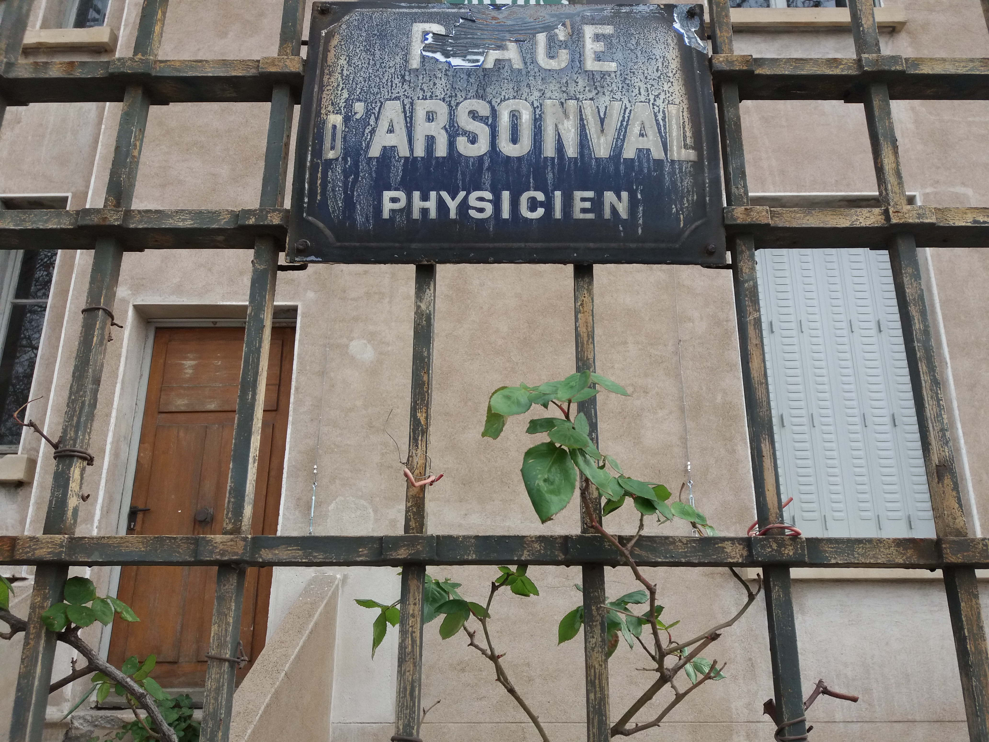 Plaque.